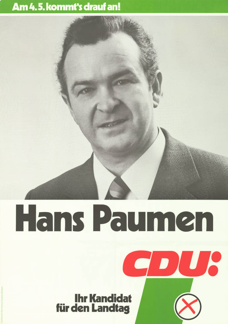 Am 4.5. kommt's drauf an! Hans Paumen CDU: Ihr Kandidat für den Landtag Abbildung: Porträtfoto - Stimmkreuz Plakatart: Kandidaten-/Personenplakat mit Porträt Auftraggeber: Verantw.: CDU-Präsidium Nordrhein-Westfalen Objekt-Signatur: 10-009 : 792 Bestand: Landtagswahlplakate Nordrhein-Westfalen (10-009) GliederungBestand10-18: Landtagswahlplakate Nordrhein-Westfalen (10-009) » CDU Lizenz: KAS/ACDP 10-009 : 792 CC-BY-SA 3.0 DE